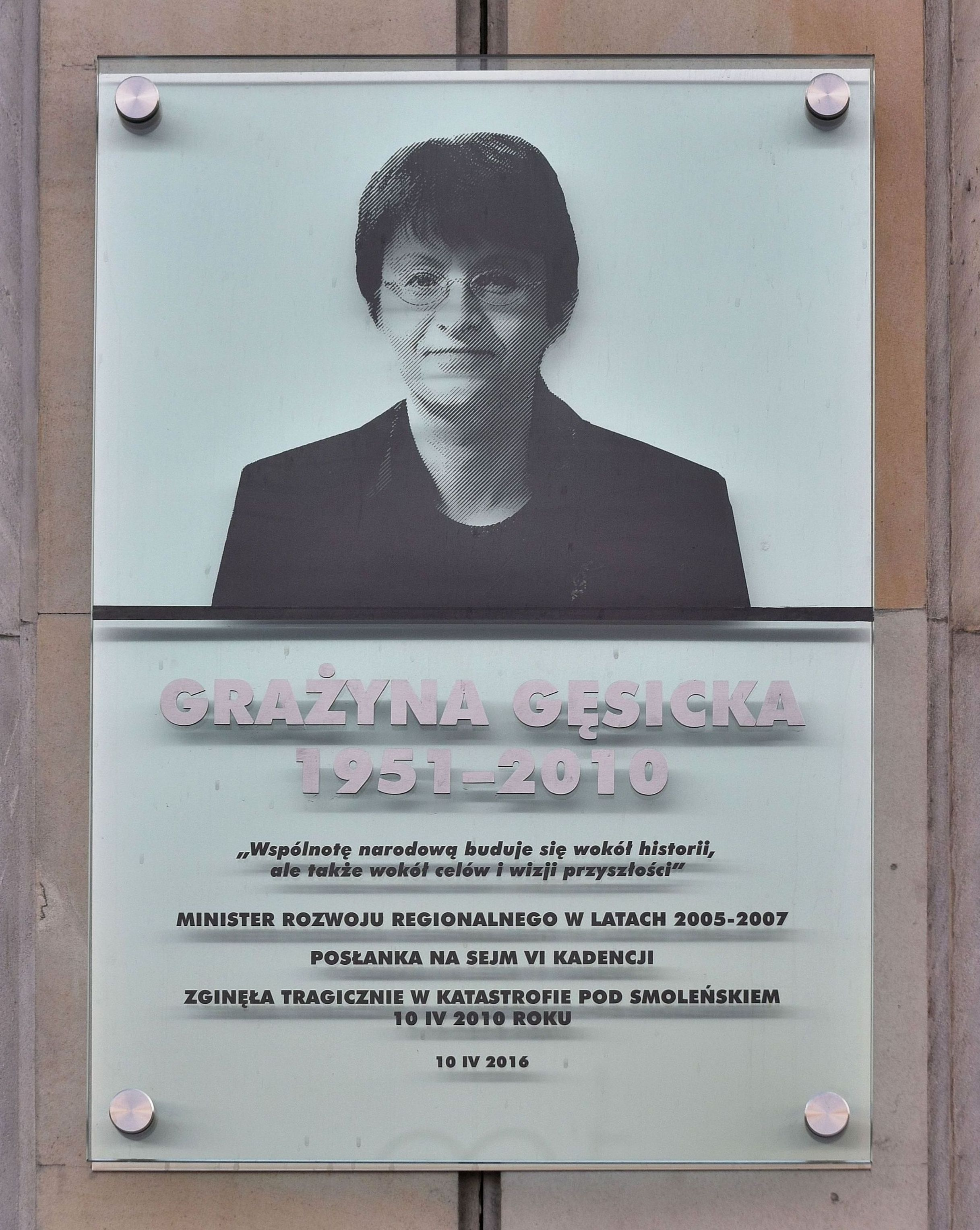 Tablica upamiętniająca Grażynę Gęsicką na budynku Państowej Komisji Planowania Gospodarczego przy placu Trzech Krzyży 3/5 w Warszawie